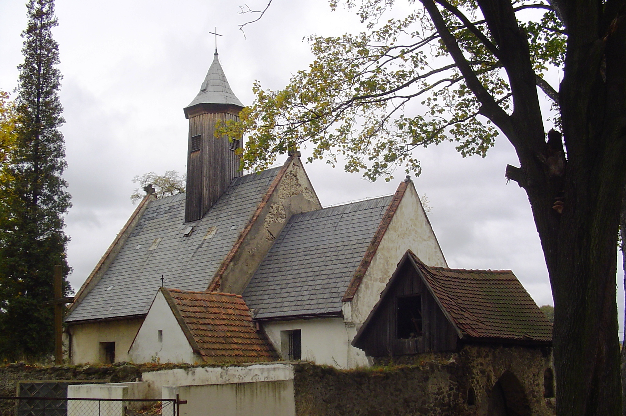 Modliszów - kościół filialny p. w. św. Bartłomieja (zabytek nr rejestr. A/1761/11 19.07.1964)